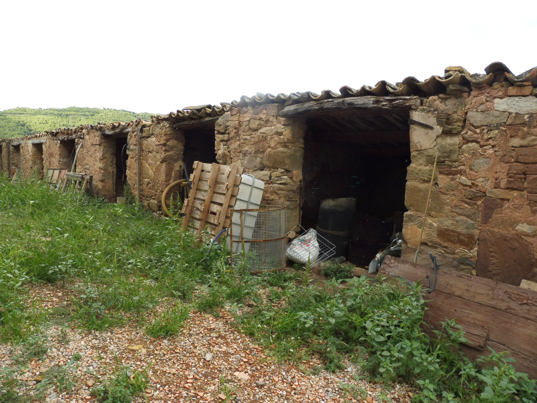 Can Torres (Súria): coberts de les tines